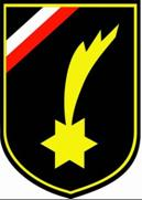 Panzerstab4